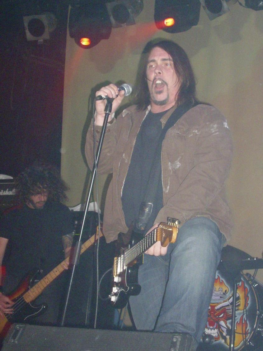 Sala Heineken Madrid , 28 Nov 2008